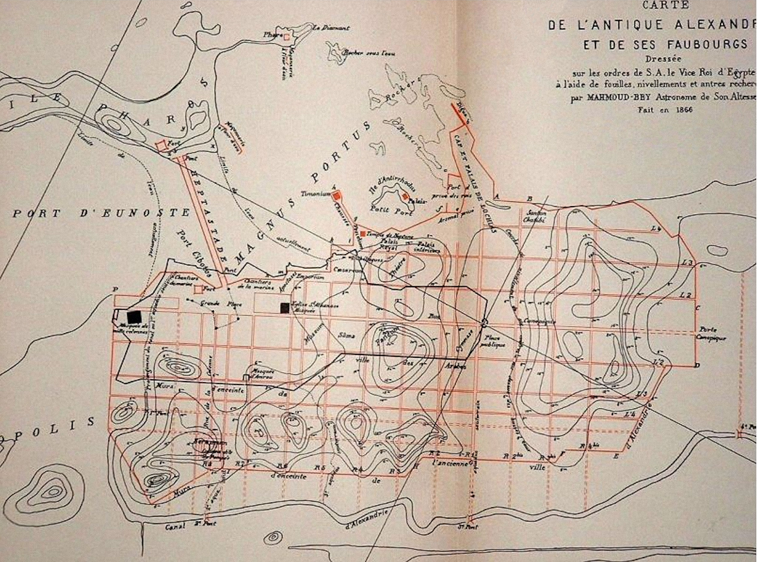 Χάρτης της αρχαίας Αλεξάνδρειας από τον Μαχμούτ Μπέη (1872)